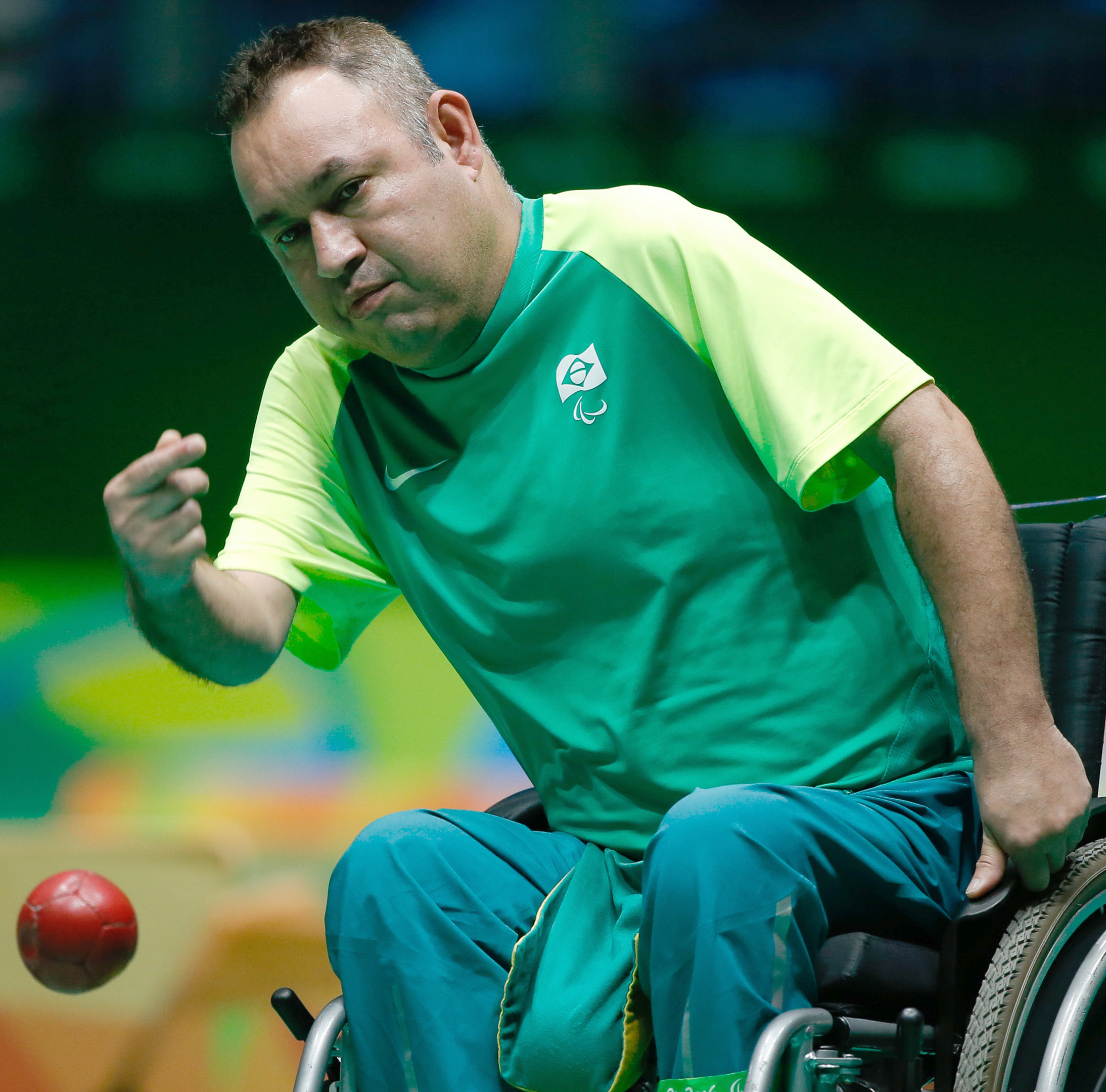 Rio de Janeiro - Brasileiros ficam com medalha de prata após derrota para Eslováquia na final da bocha BC4 nos Jogos Paralímpicos Rio 2016 (Fernando Frazão/Agência Brasil)